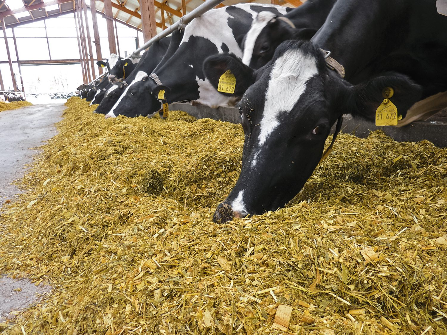 Die pansenfreundliche Struktur der Silage verbessert auch die Gesundheit der Tiere.